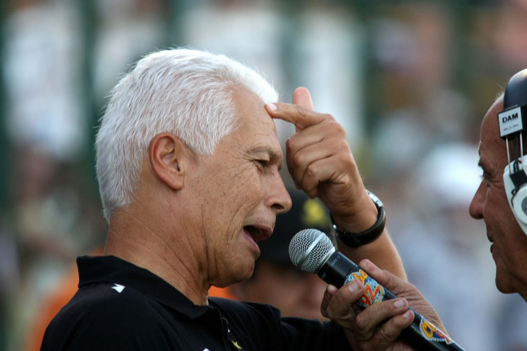 (portuguese) Emerson Leão, ex-jogador e hoje técnico de futebol brasileiro